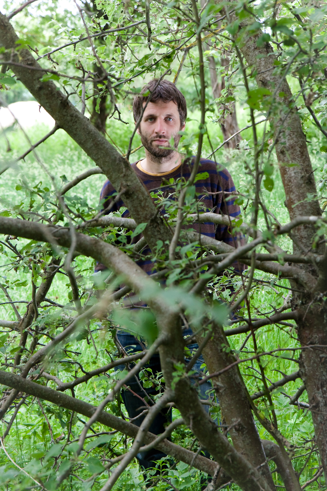 Helilooja Märt-Matis Lill Emajõe tänava lõpus.